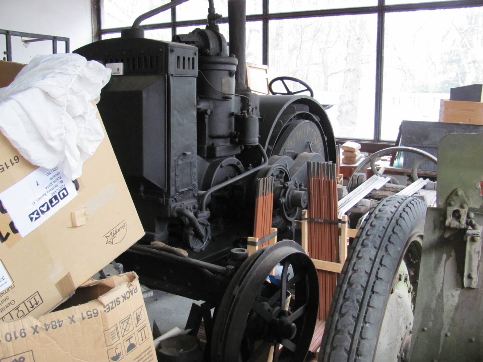 Трактор "Запорожець" №107